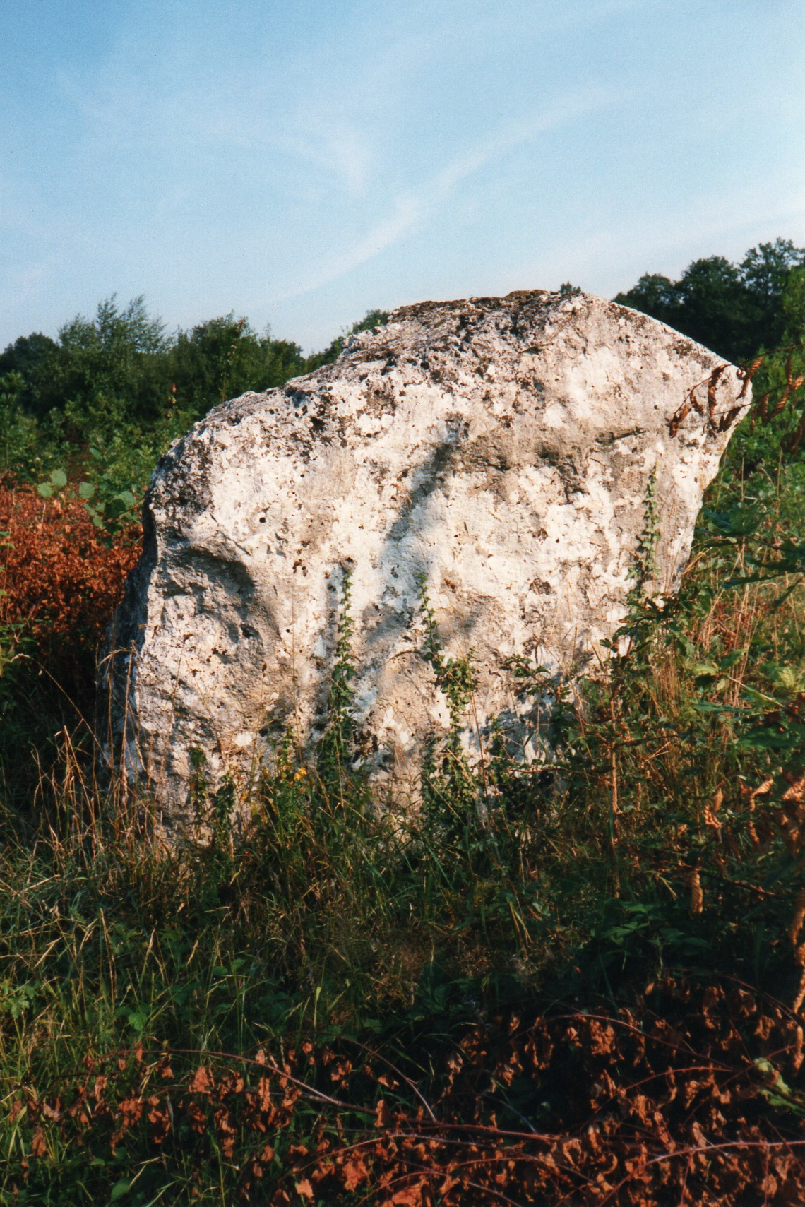 Le menhir « La Pierre-qui-Vire » à Gurgy-le-Château (Côte-d'Or, France)